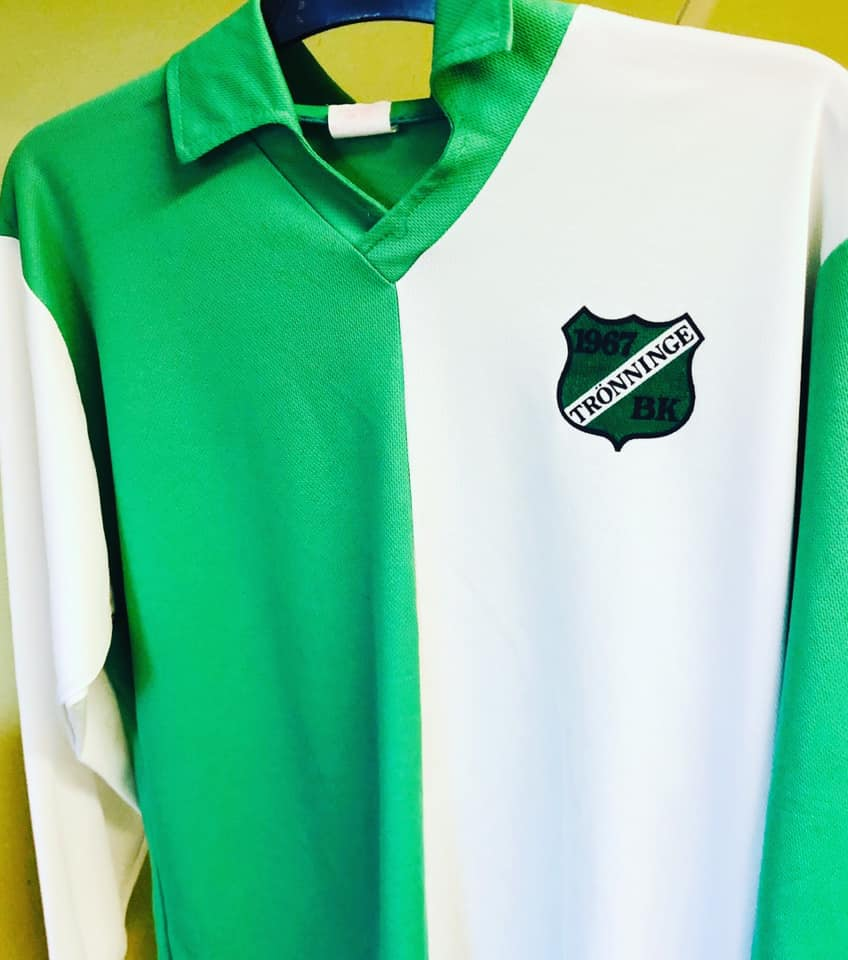 Den klassiska tröjan